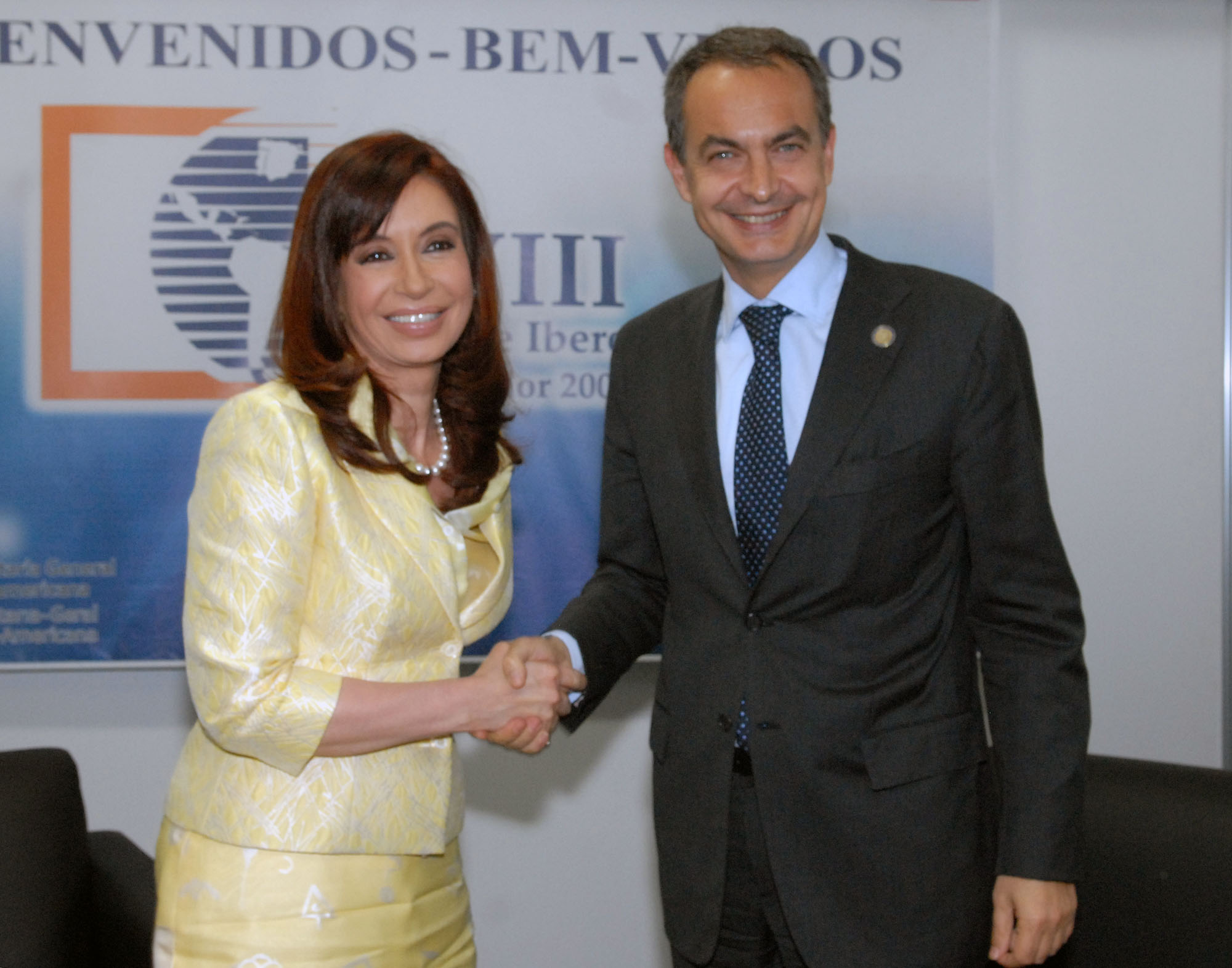 Cristina Fernández durante el encuentro bilateral con el presidente del Gobierno de España (Cumbre Iberoamericana 2008, Santiago de Chile